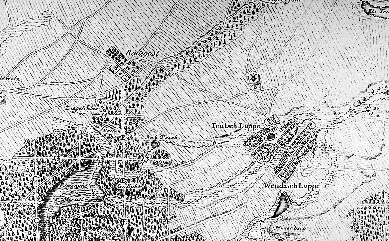 Original image description from the Deutsche Fotothek Wermsdorf-Luppa. Grundriss der Mutzschener Heide, Mitte 18. Jh.